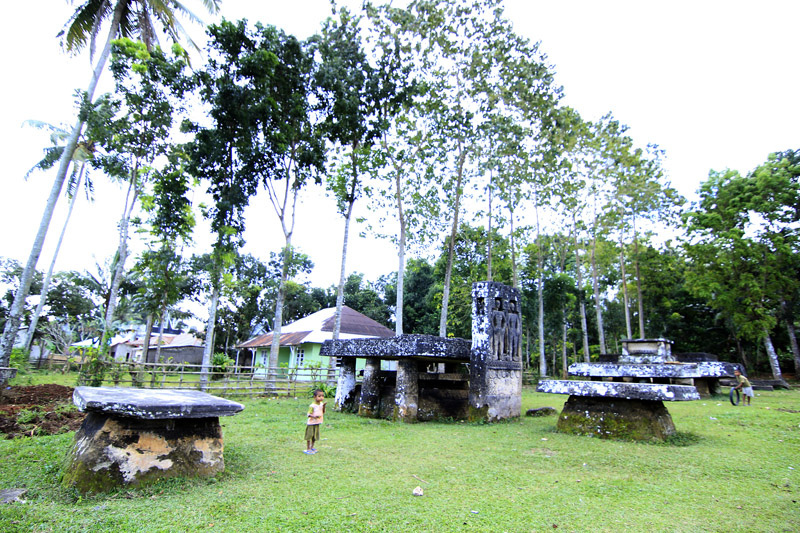 Megalithic Royal Grave Stones - Anakalang Central Sumba